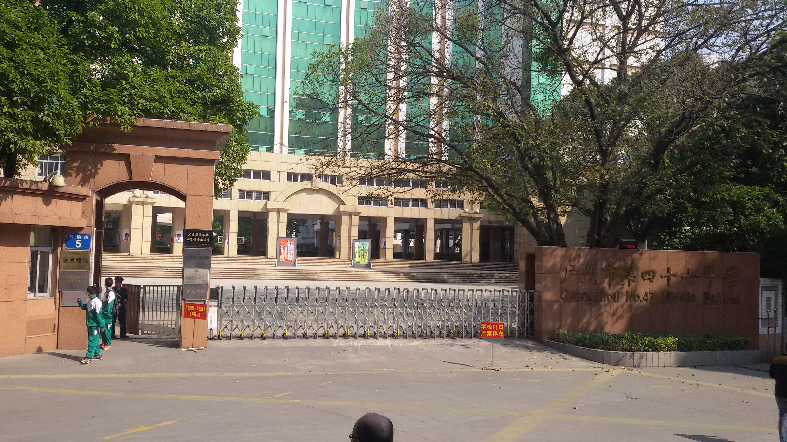 粵語: 廣州市第卌七中學嘅五山校區